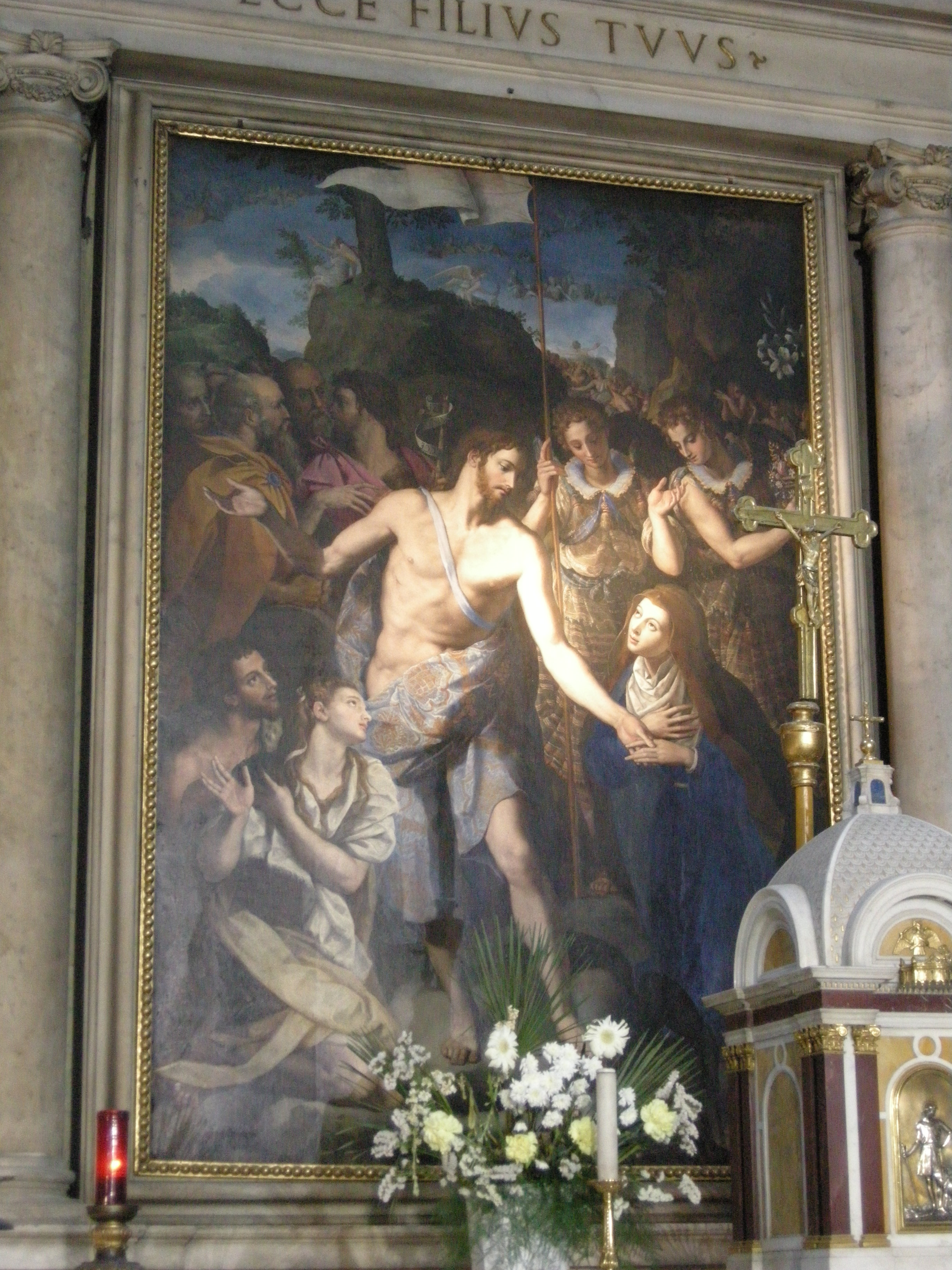 San marco, firenze, cappella salviati, alessandro allori, discensa nel limbo, 1593 circa